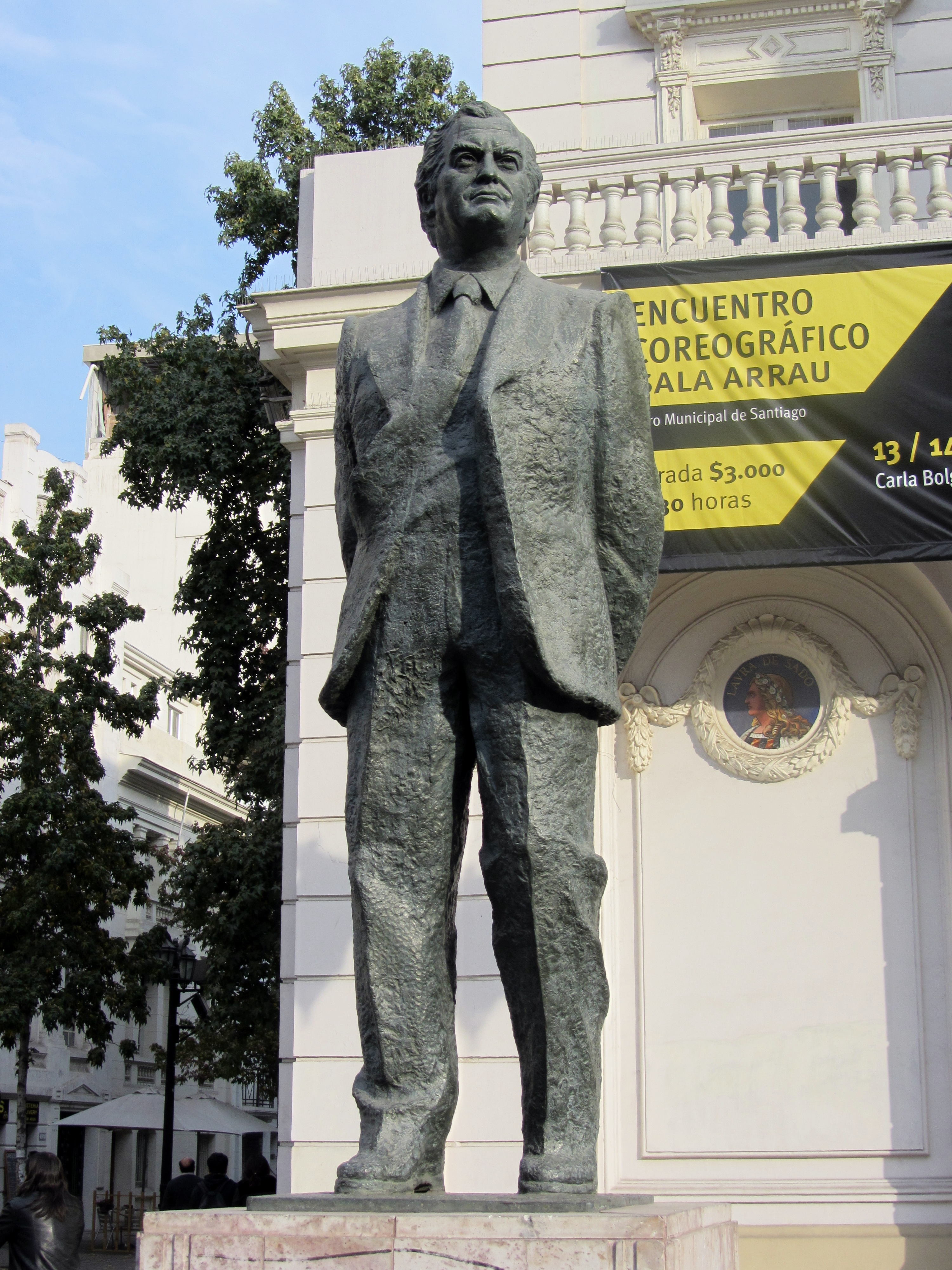 Estatua de Patricio Mekis en la plazoleta homónima, en Agustinas con Tenderini, ante la fachada del Teatro Municipal de Santiago, Chile. La escultura es de Galvarino Ponce.